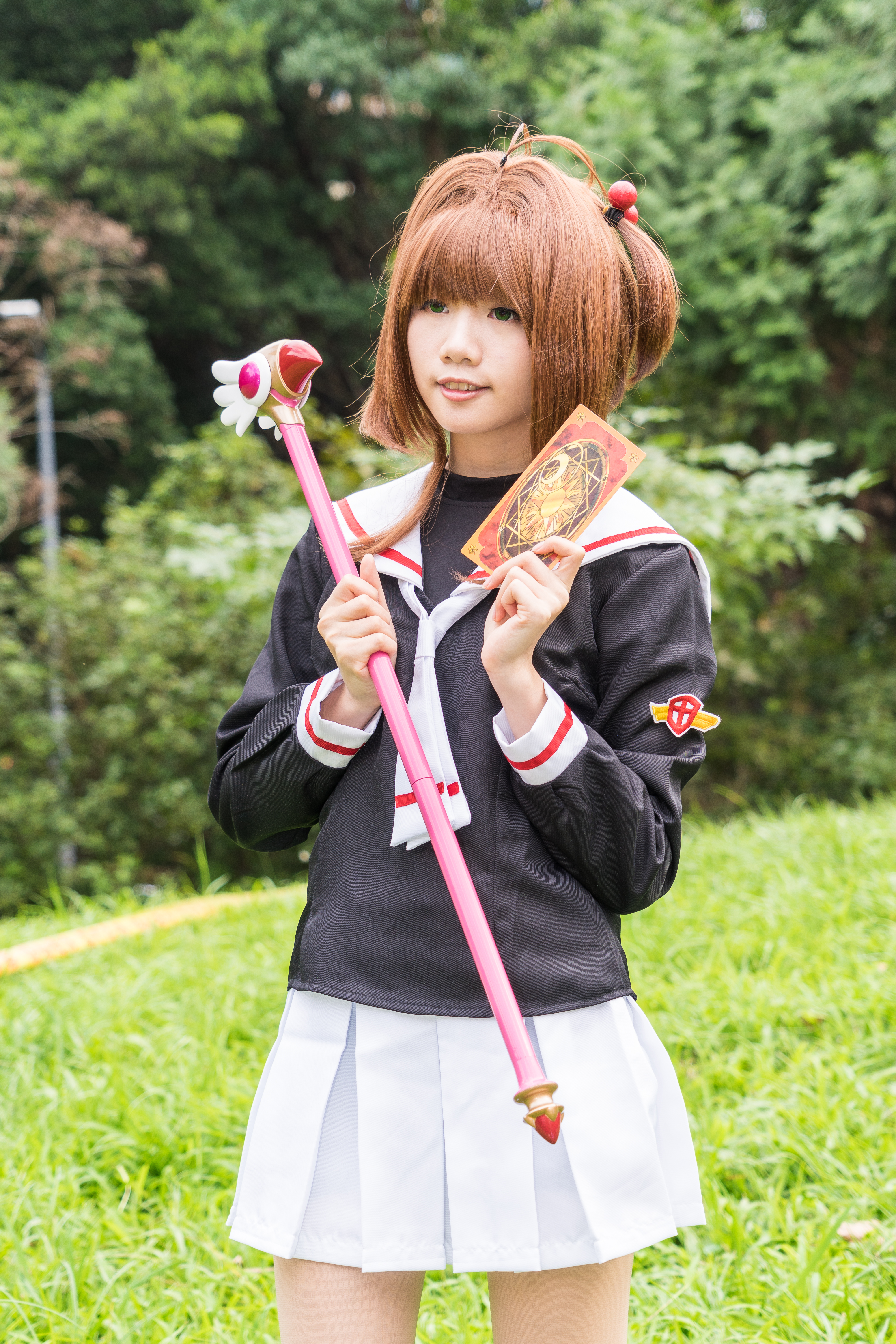 第47屆台灣同人誌販售會，《庫洛魔法使》木之本櫻cosplayer。